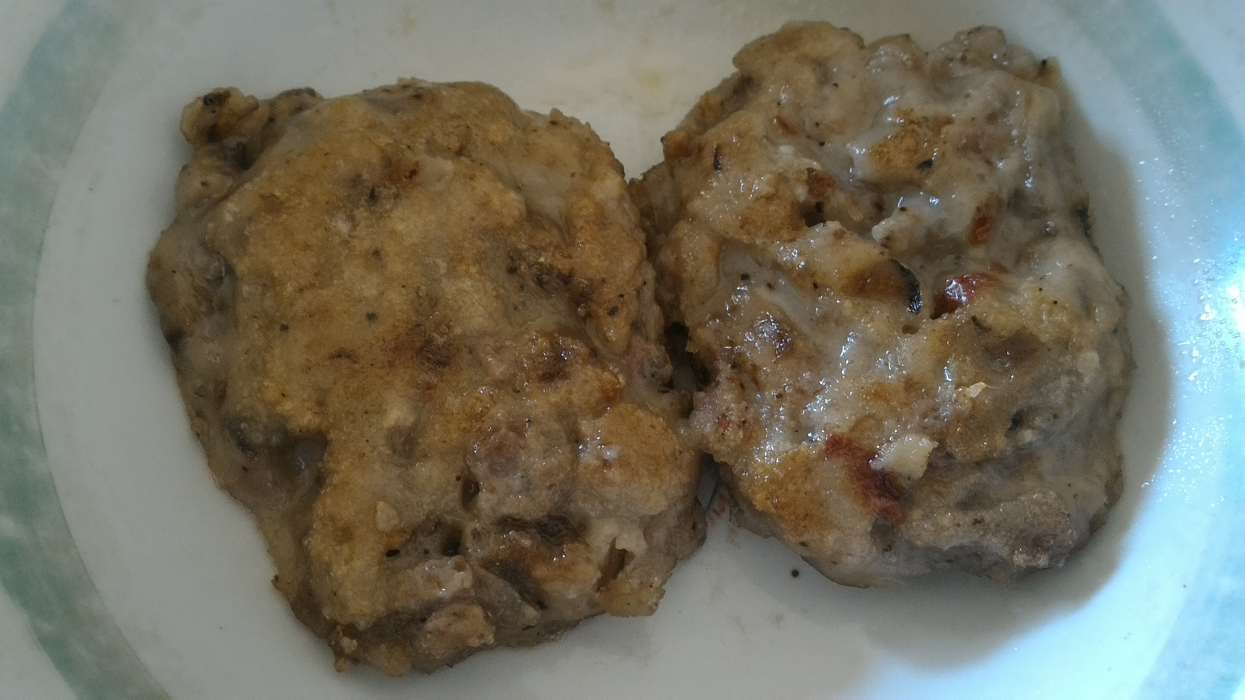 中文（台灣）: 煎過的芋粿。